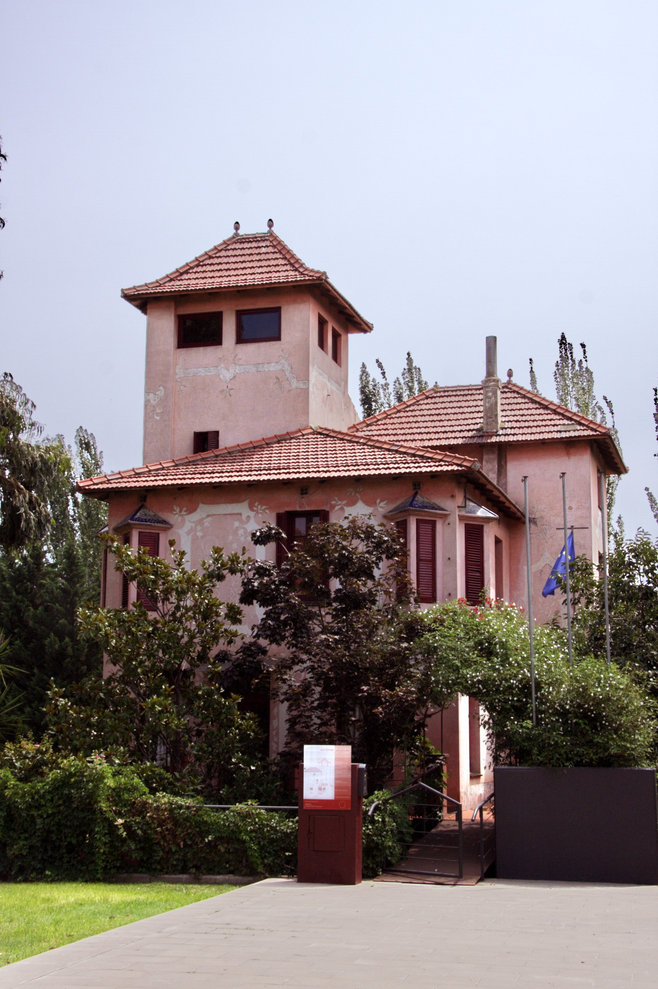 Torre Cebrià Camprubí a Cornellà (Catalunya), obra de Josep Maria Jujol de 1928.